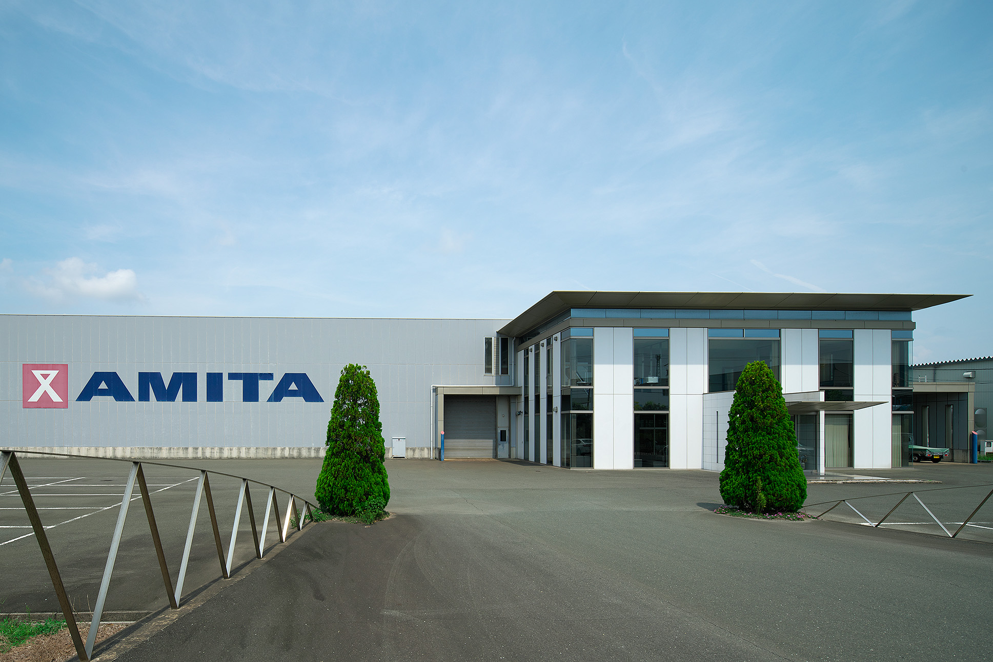 AMTIA Factory